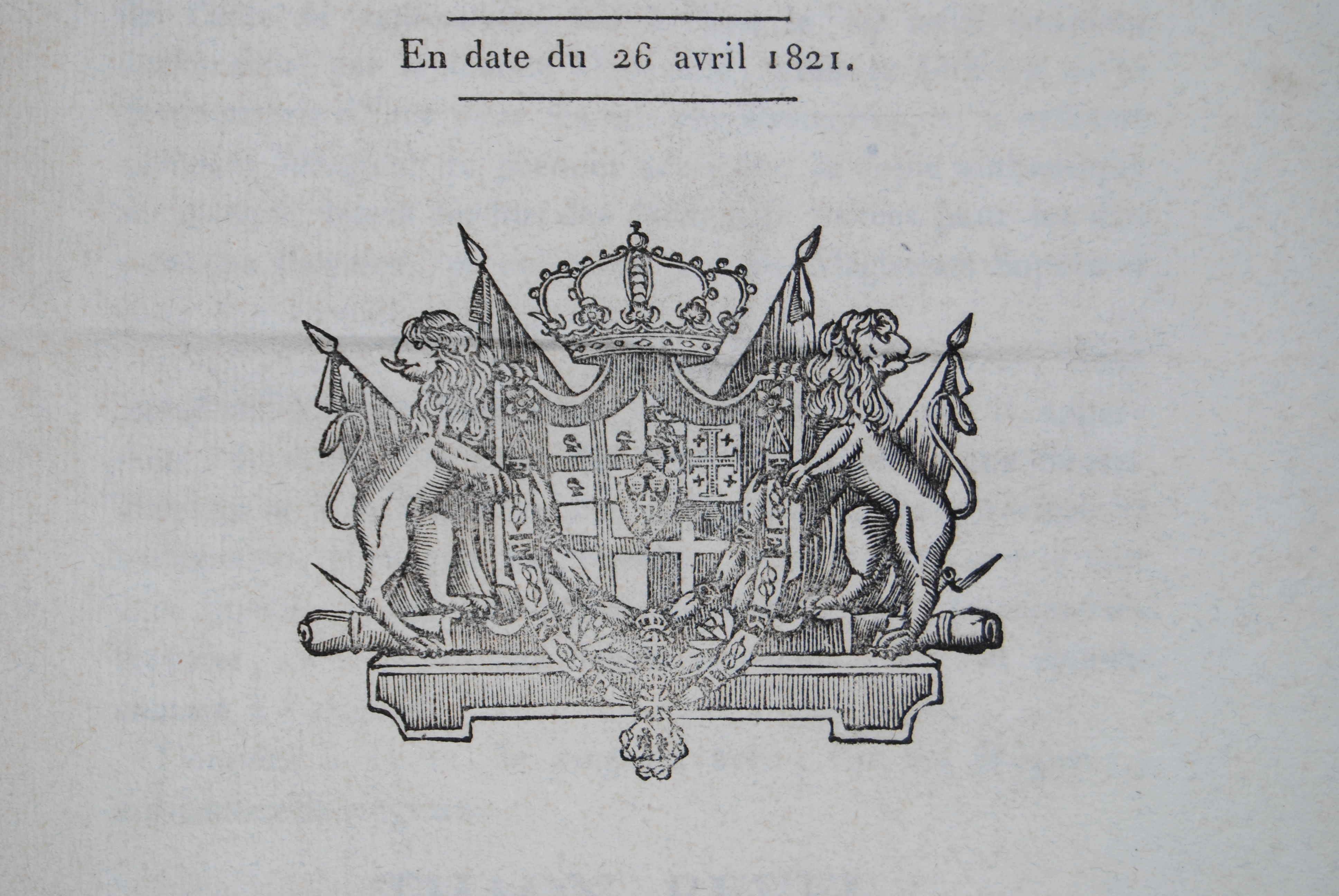 Détail de la lettre-patentes de SM le Roi de Piémont-Sardaigne enregistrant l'acte d'abdication du roi Victor-Emmanuel du 13 mars 1821, imprimée le 26 avril 1821 par l'Imprimerie Pierre Albera, Chambéry.